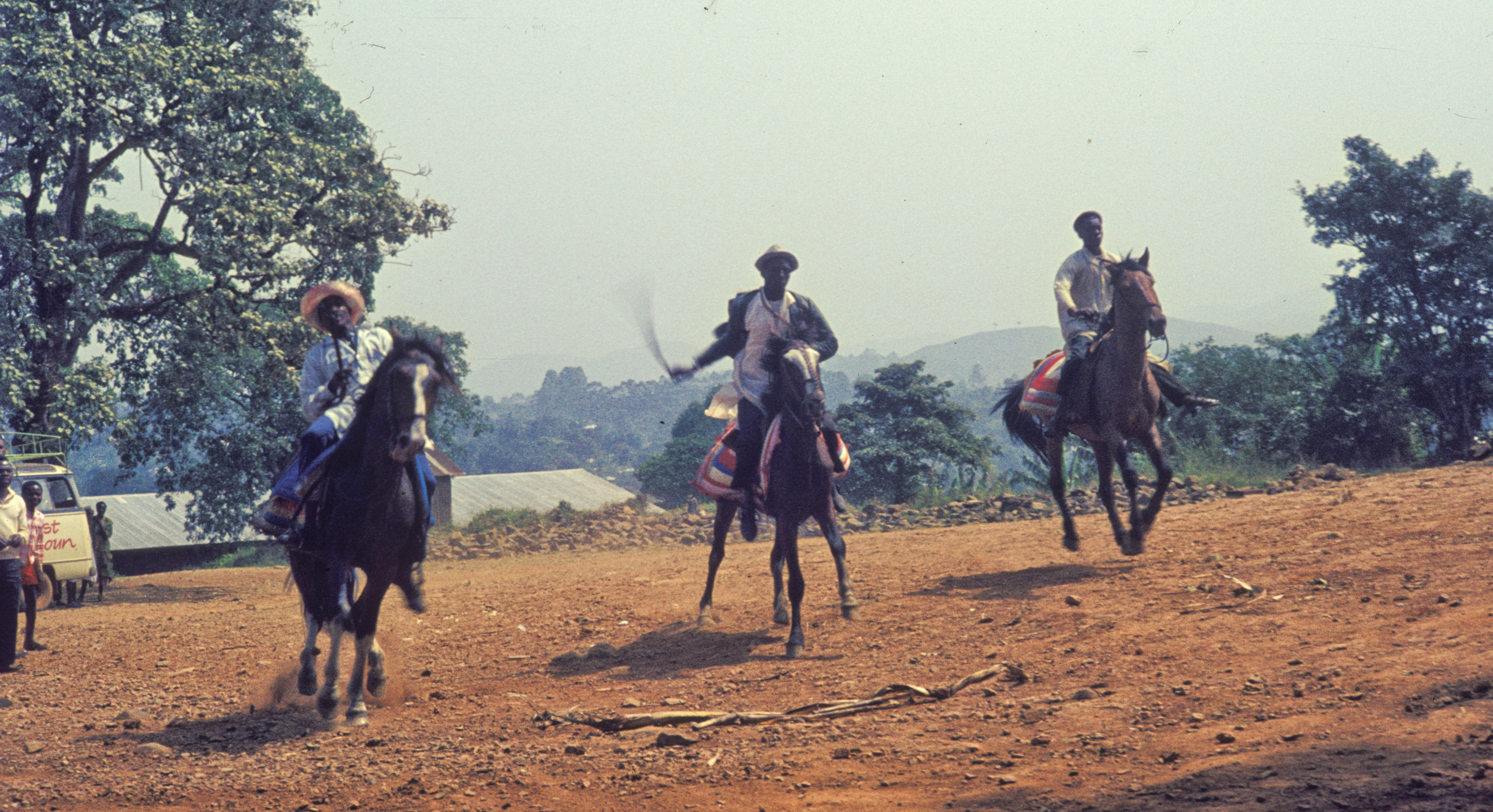 Cameroon